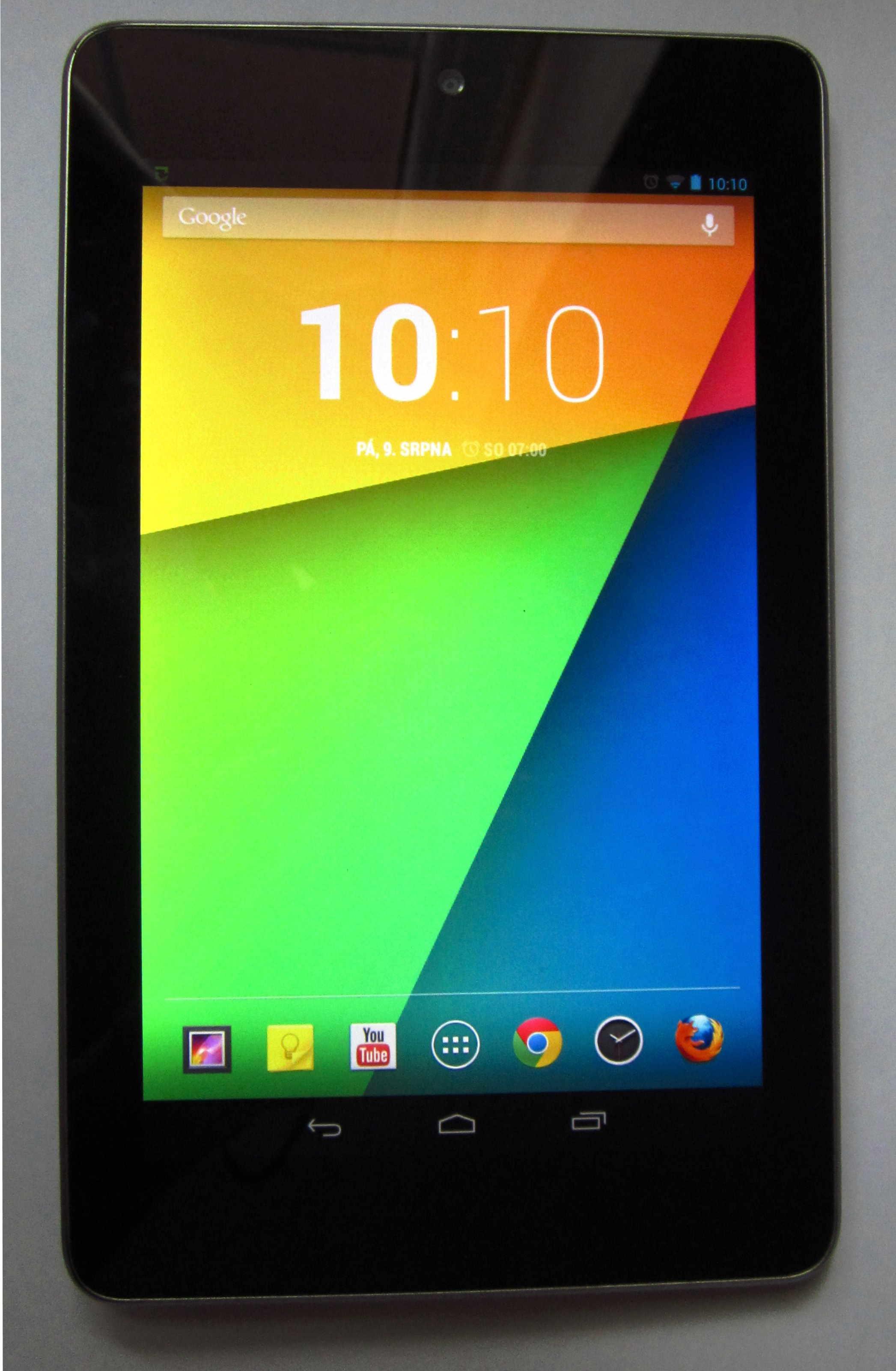 Nex 7 first generation 4.3